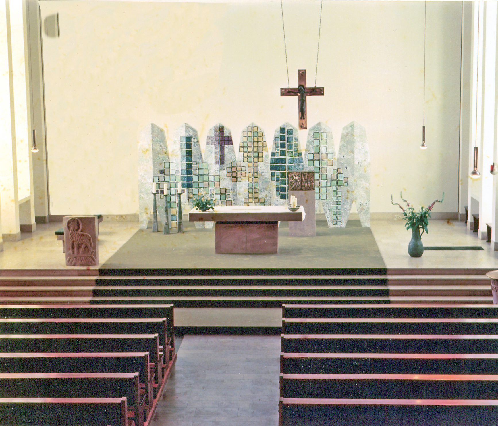 Innenraum der St. Hedwigskirche in Bielefeld-Heepen nach der Renovierung